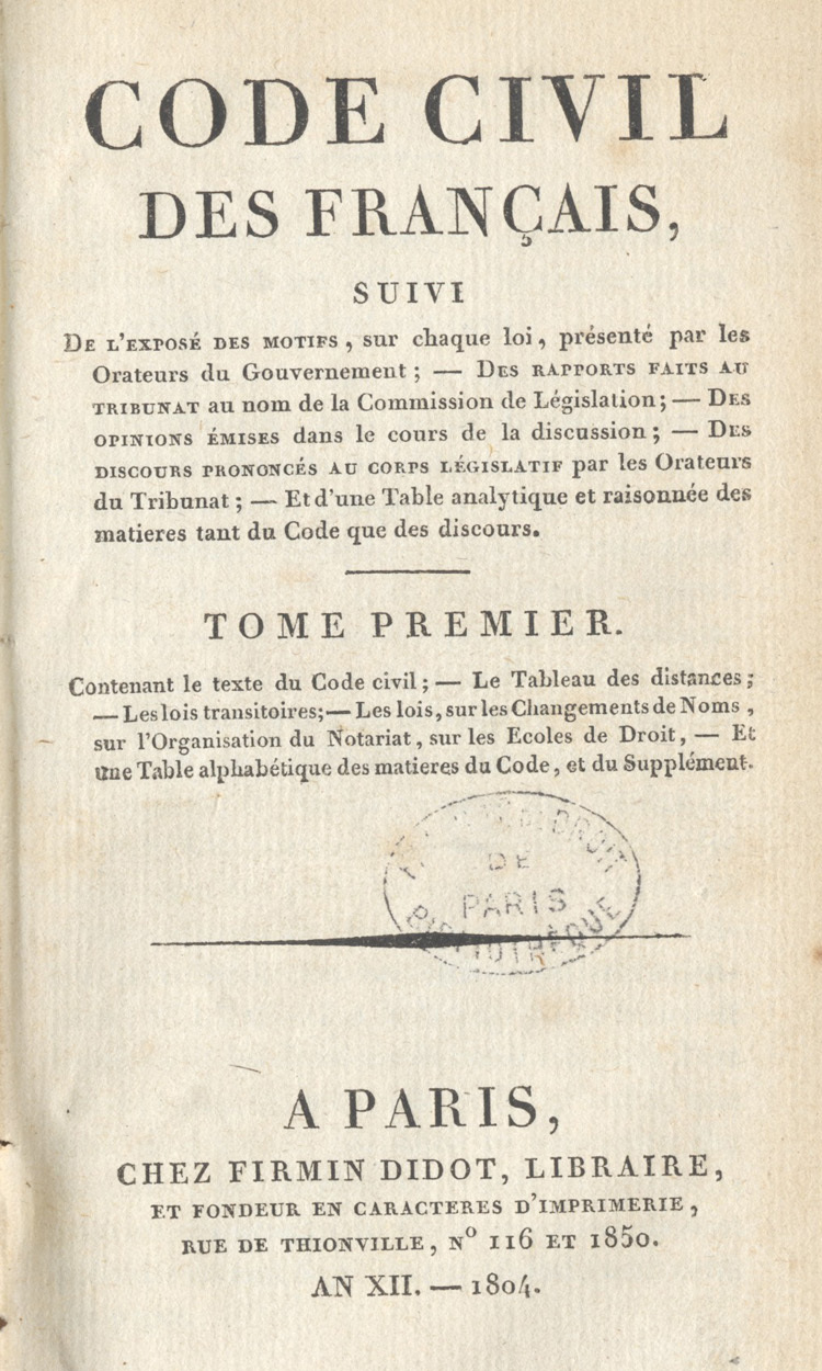 Code civil des Français. Paris : chez Firmin-Didot